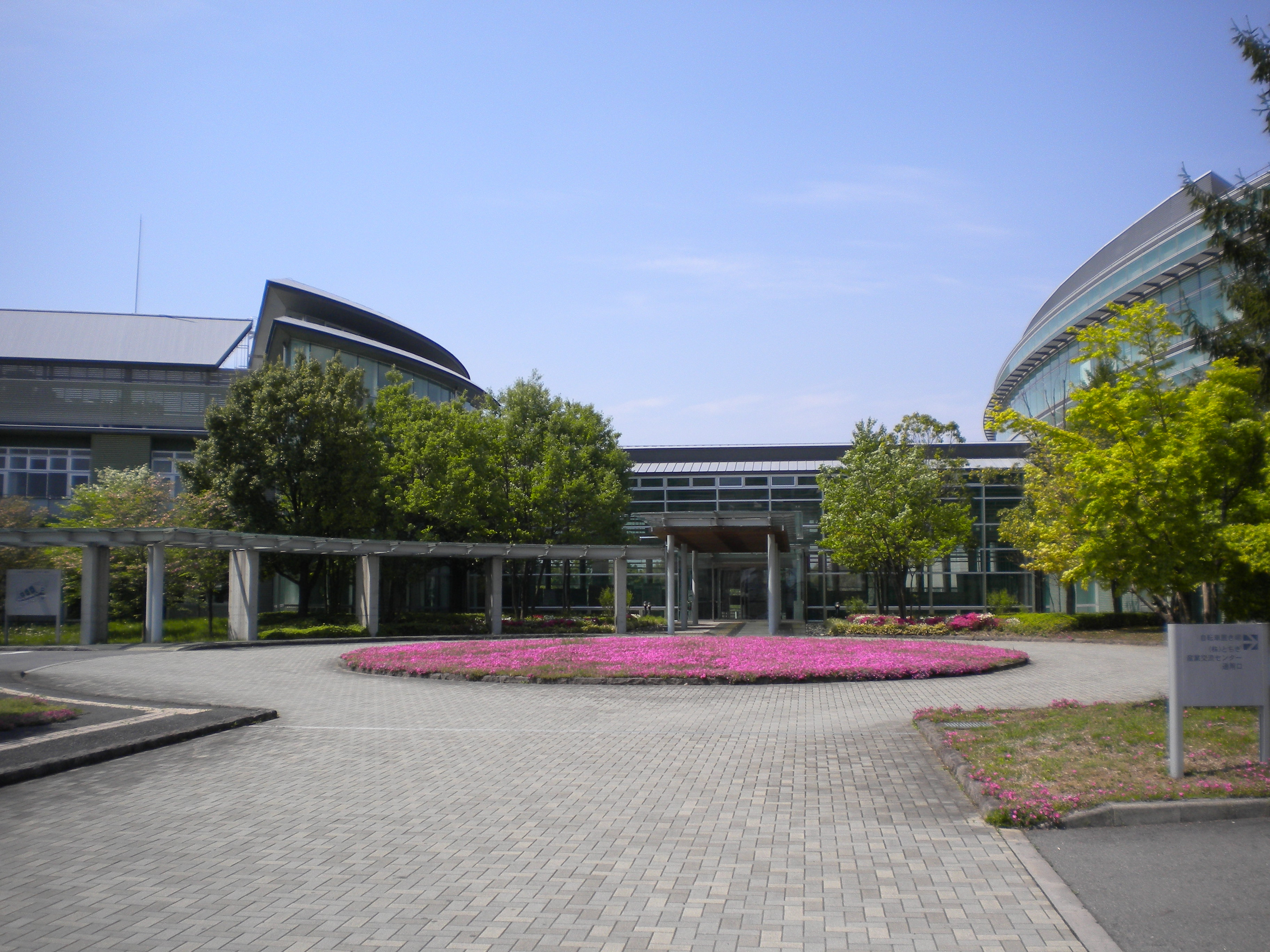 とちぎ産業創造プラザ 栃木県宇都宮市ゆいの杜1丁目 投稿者撮影